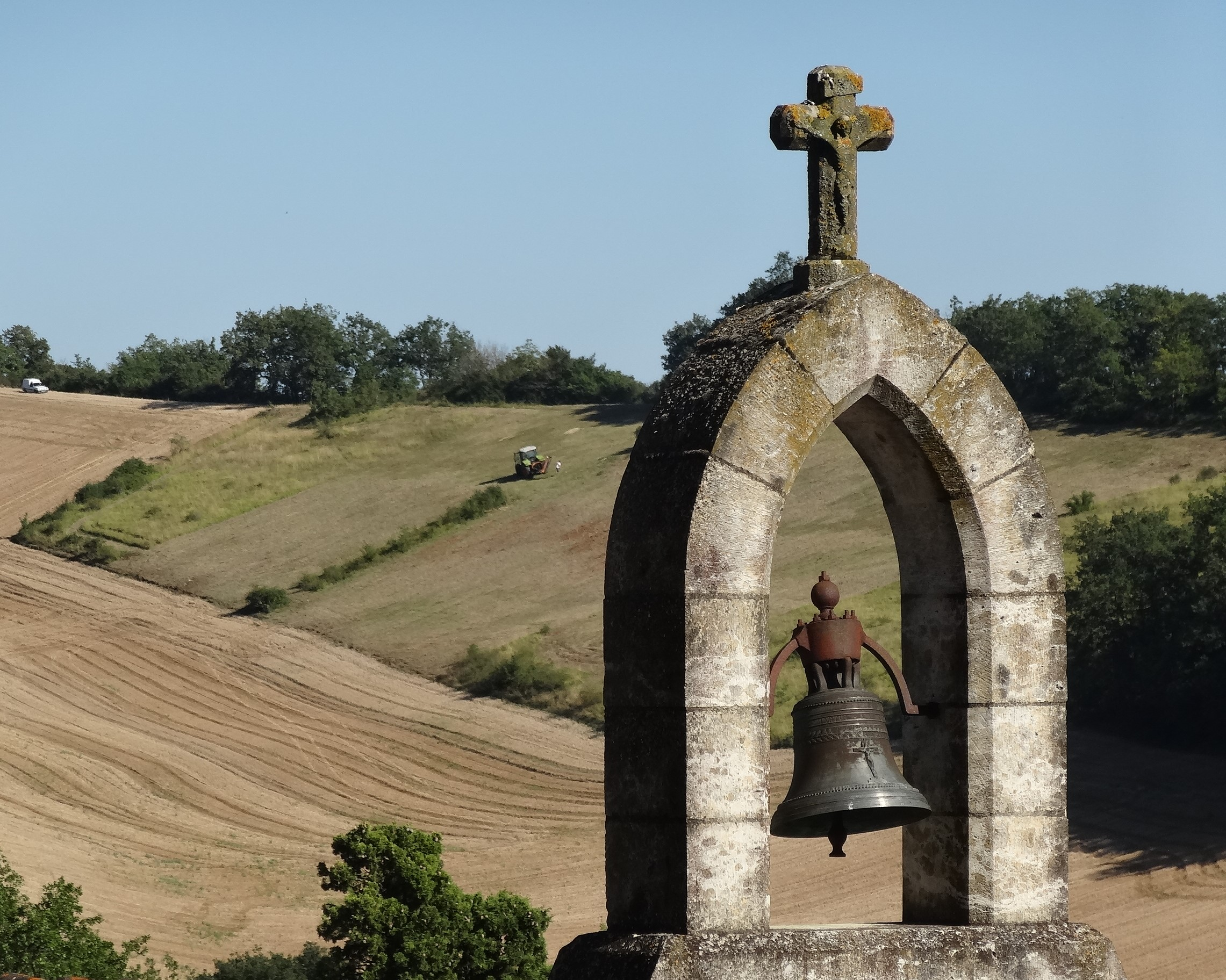 Cloche d'une chapelle de Castelnau-Barbarens.